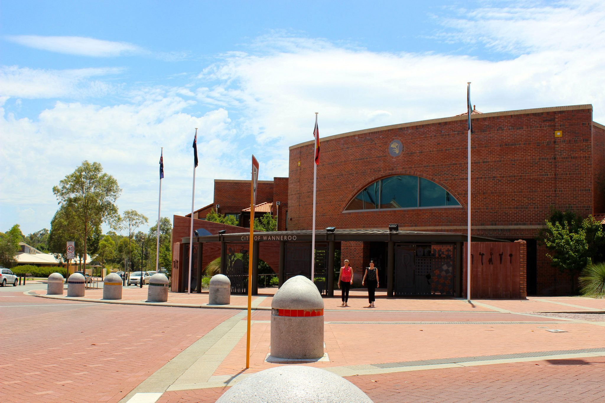 Centro de Wanneroo en Australia Occidental